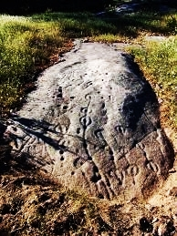 पाली pālī: Petroglifo Villamiel Santa María